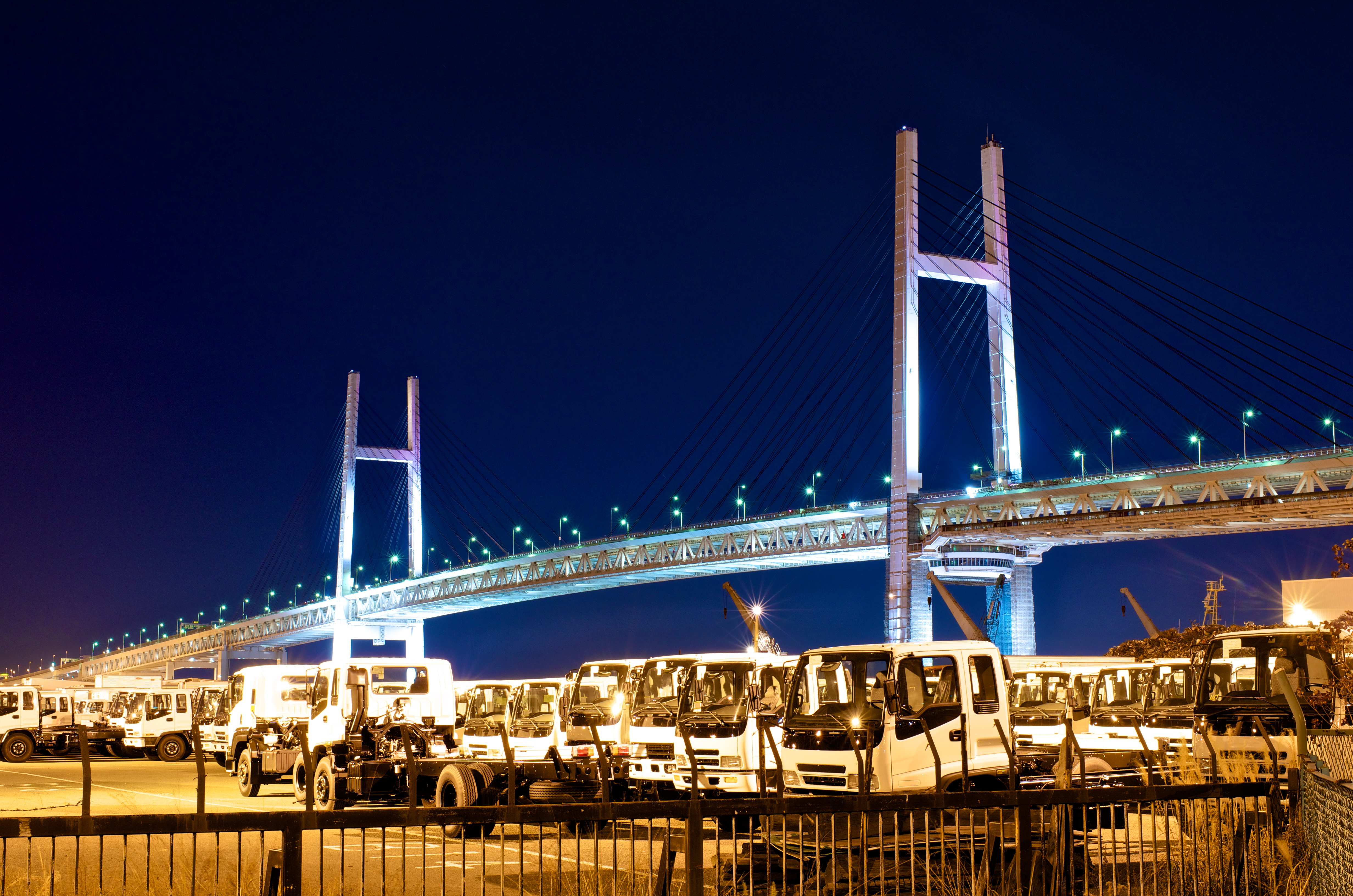 Yokohama Bay Bridge in Yokohama, Kanagawa Prefecture, Japan.